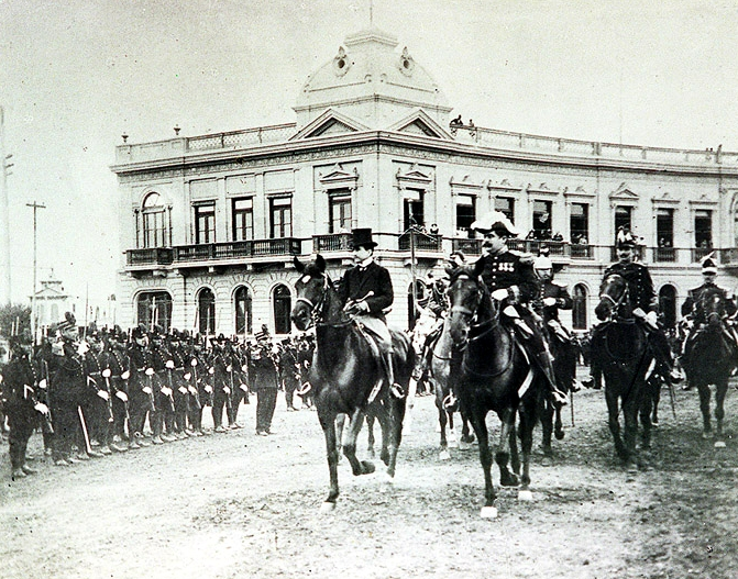 El presidente peruano Augusto B. Leguía, a caballo, en el día de la Jura de la Bandera de 1908.